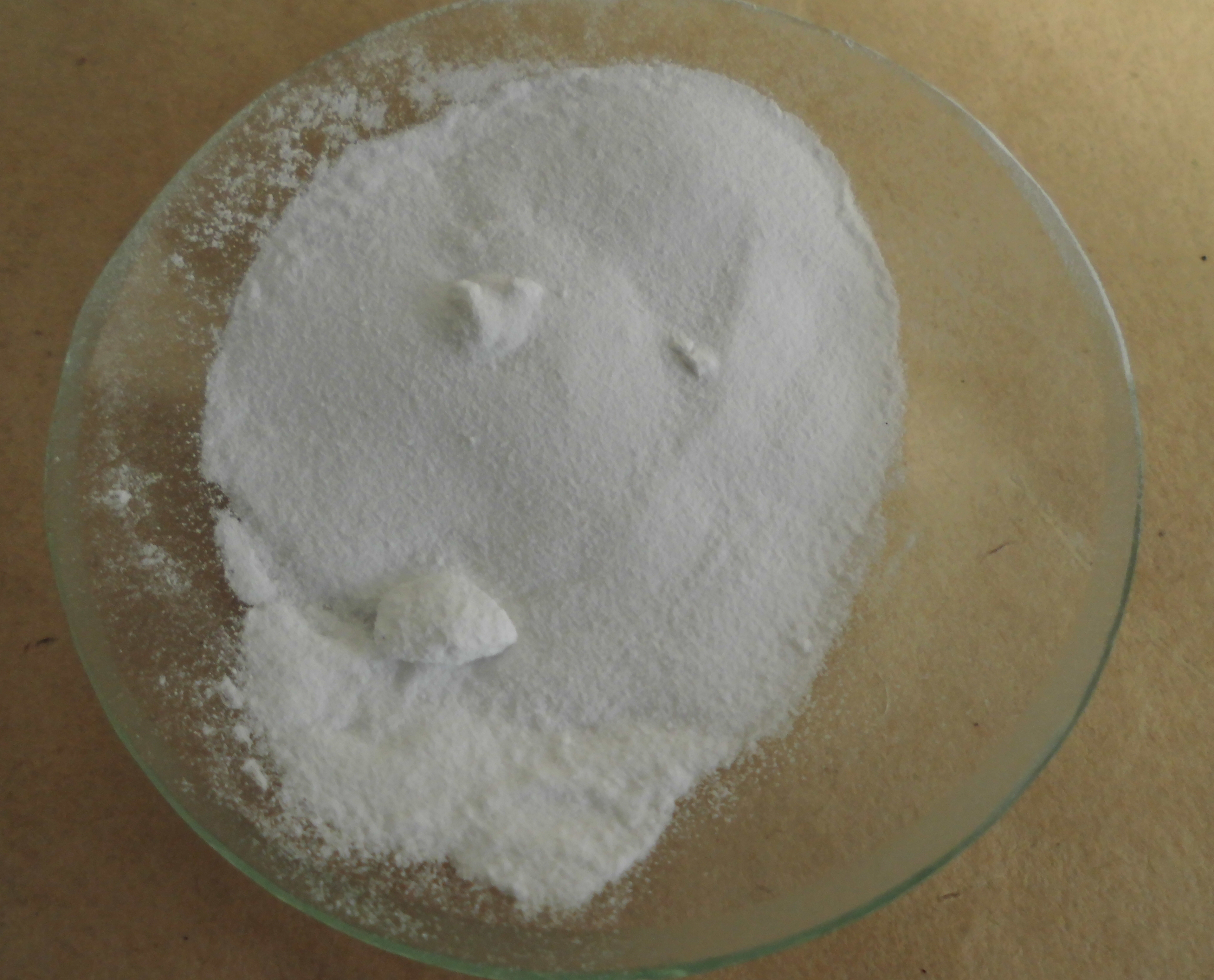 氧化钡，实验试剂级